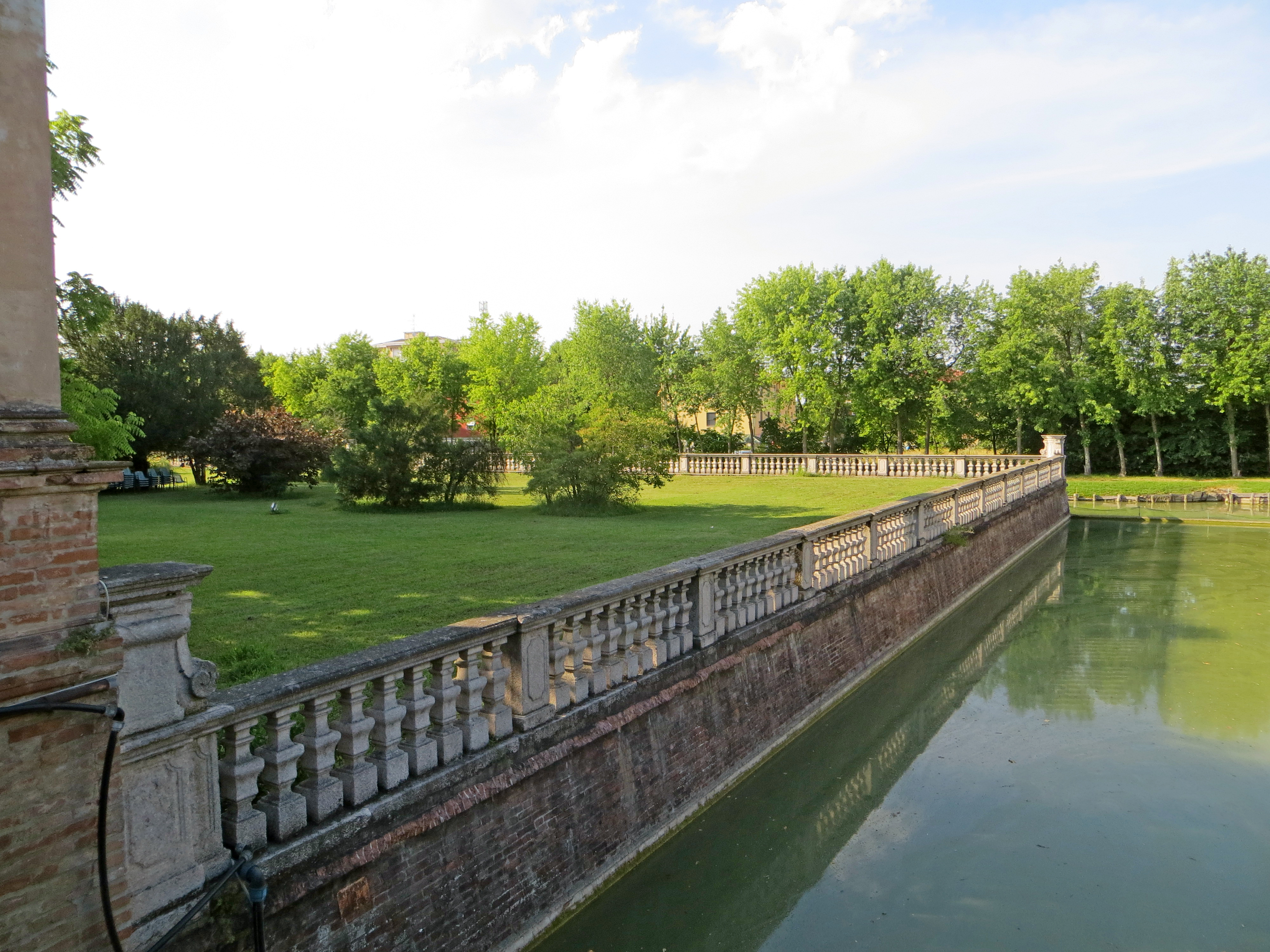 Villa Pallavicino (Busseto) - peschiera This is a photo of a monument which is part of cultural heritage of Italy.